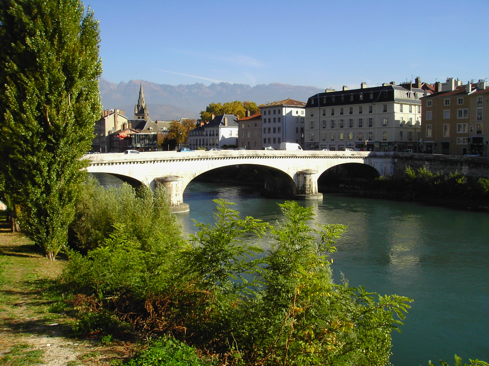 Pont Marius Gontard